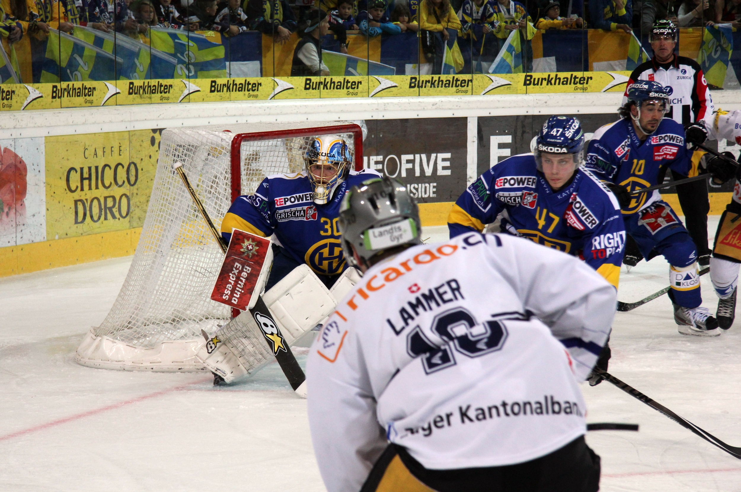 Leonardo Genoni (D 30), Dominic Lammer (Z 10), Simon Kindschi (D 47), Andres Ambühl (D 10), Danny Kurmann (R 66).